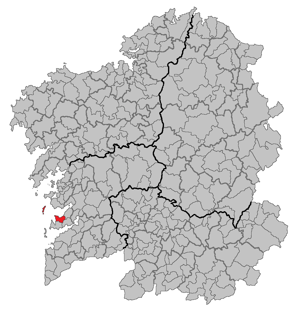 Mapa coa localización do concello de Bueu.